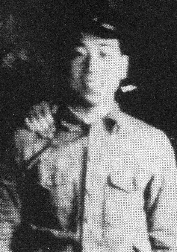 桜井眞一郎19歳、横浜工専時代の撮影。